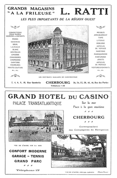 Publicité pour les Magasins Ratti et le Casino de Cherbourg